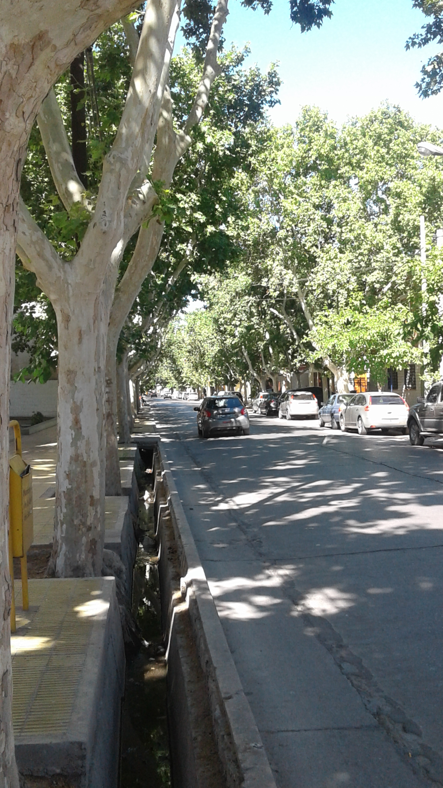 Vista de la Calle Mitre en al área central de la ciudad de San Juan, provincia de San Juan, Argentina